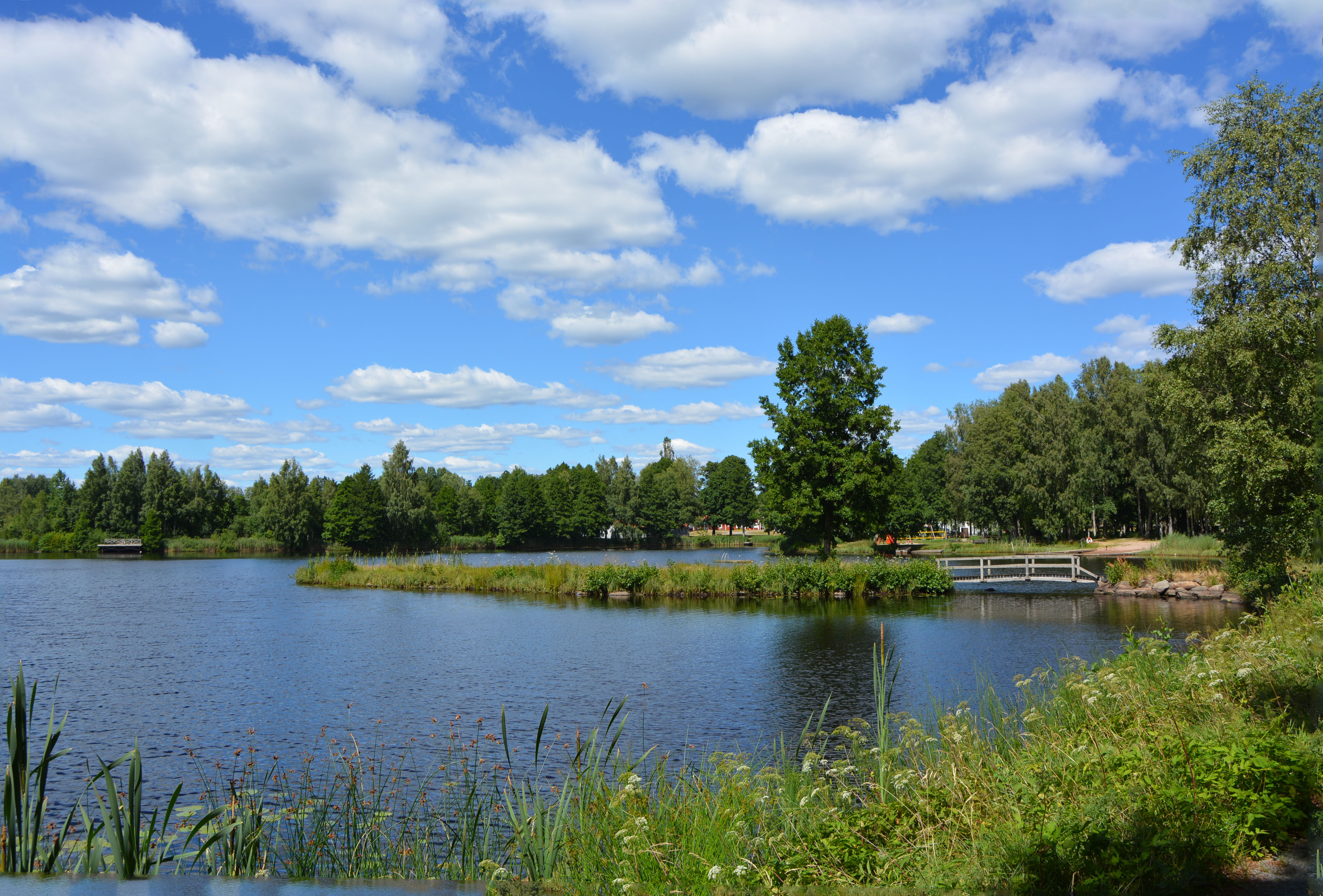 Långasjösjön